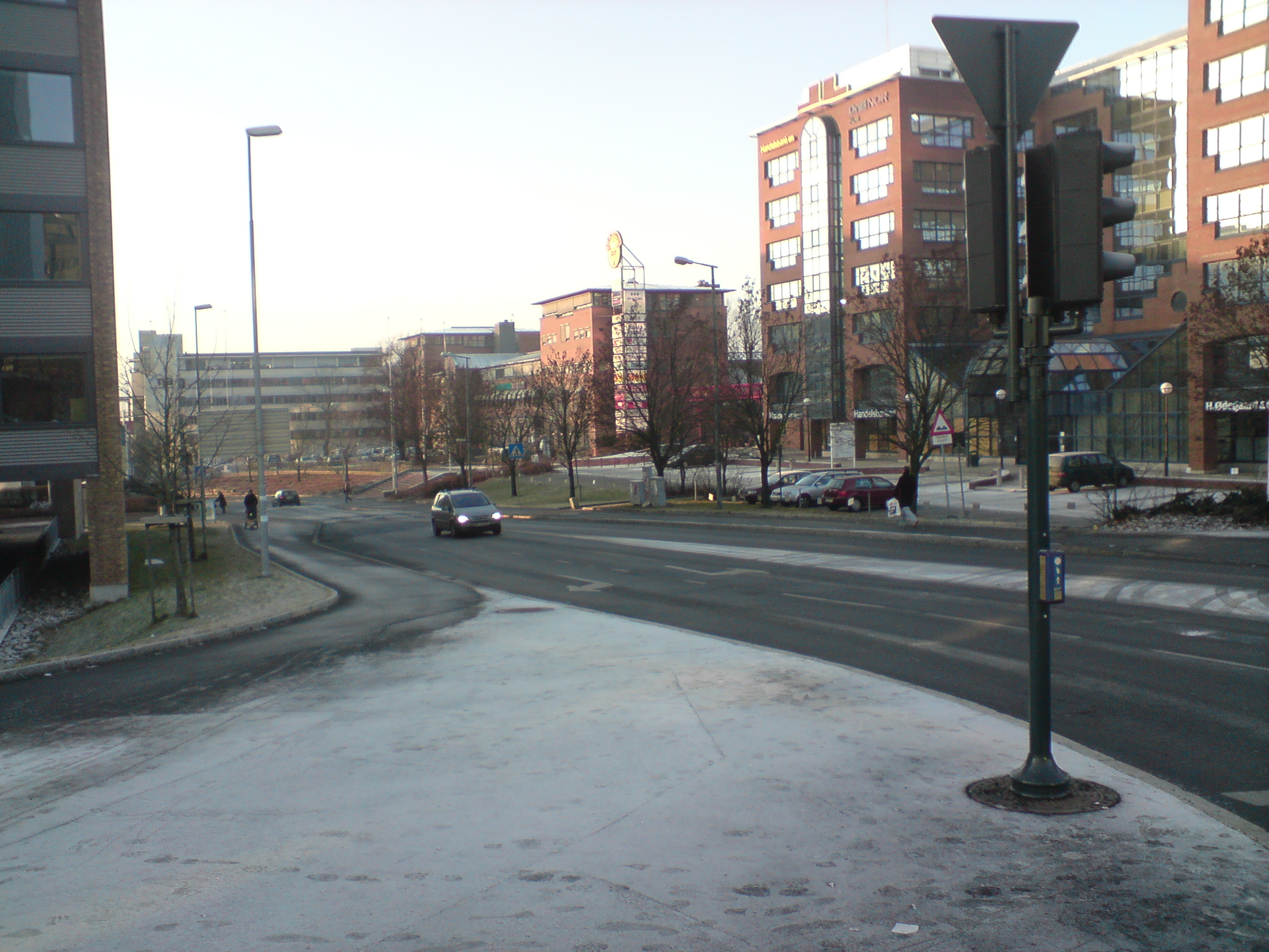 Grensesvingen in Oslo